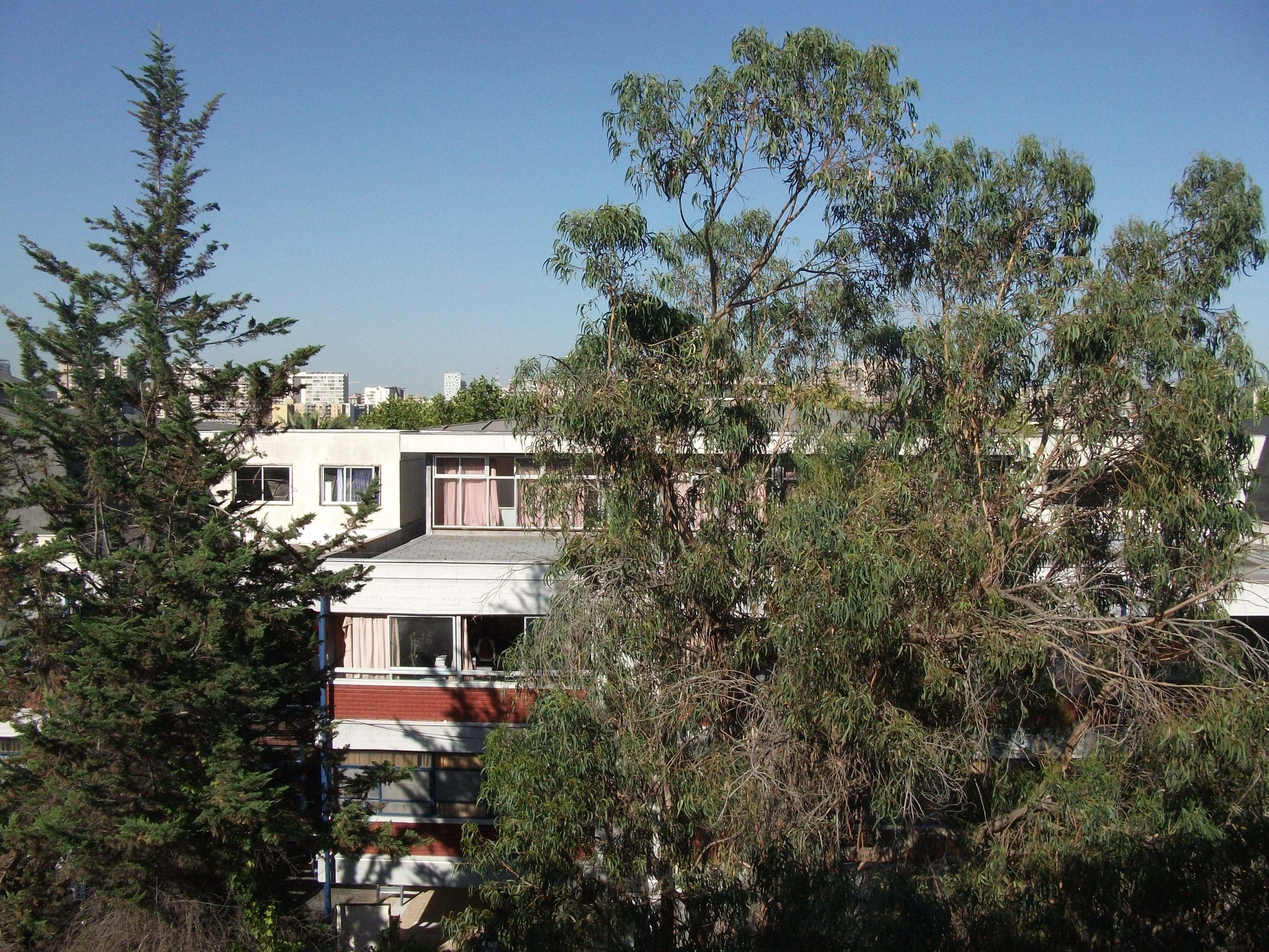 Foto que muestra parte del pabellón de enseñanza media del Liceo.